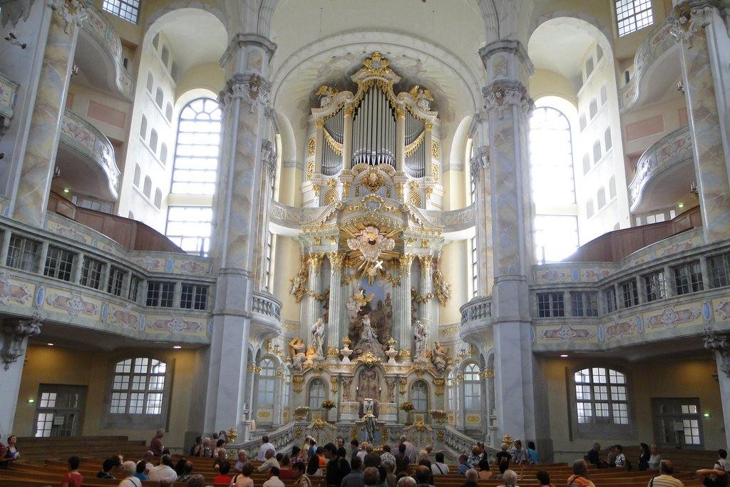 Дрезден, Фрауенкирхе (внутреннее убранство)